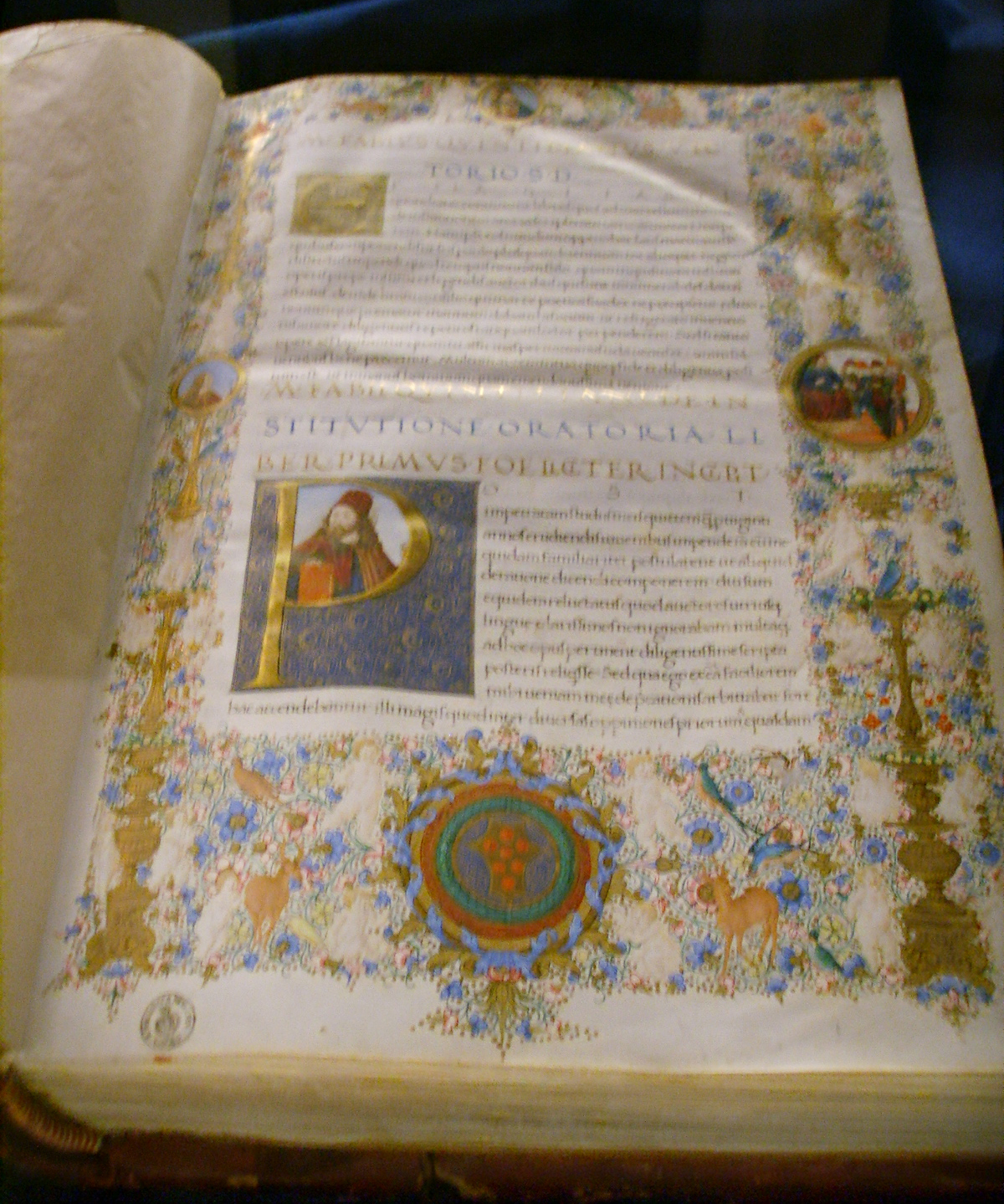 Quintiliano, istitutio oratoria, firenze XV secolo